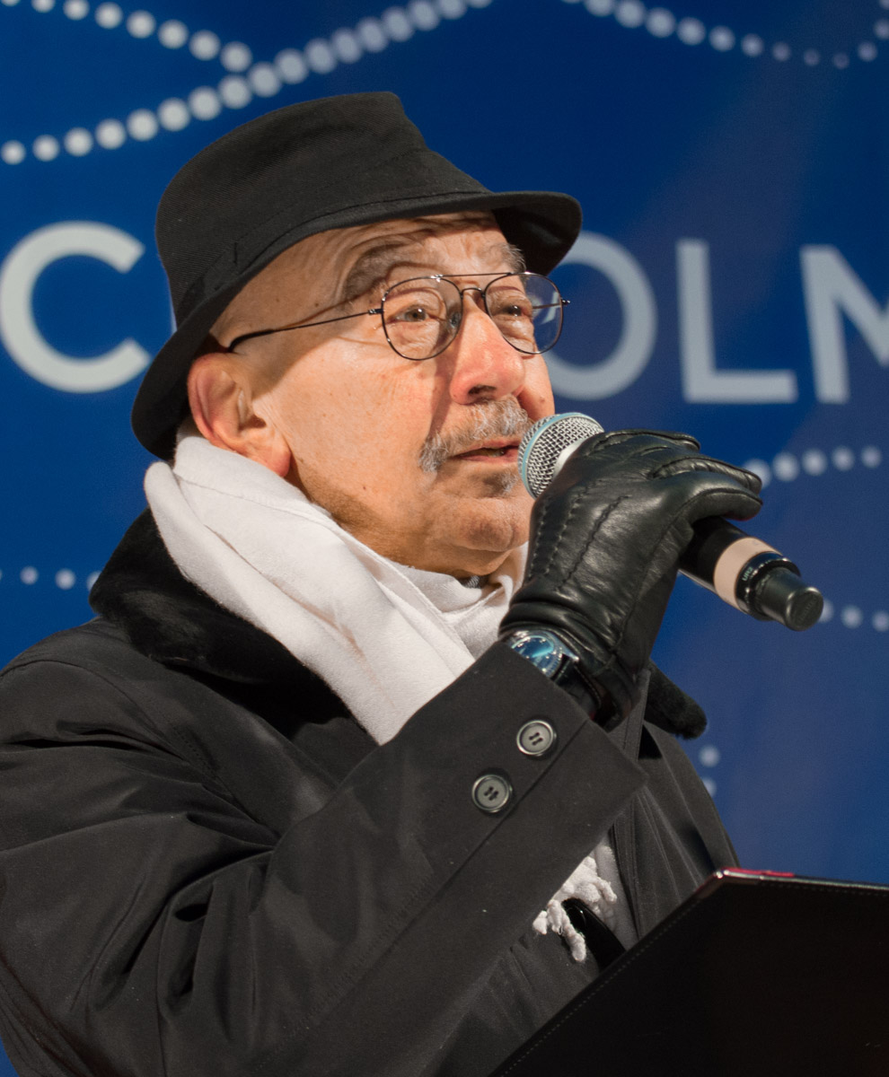 Stockholms egna jullåt framförs för första gången av Hayati Kafe på Sergels torg i samband med invigningen av Stockholmsjul 2015 den 21 november.